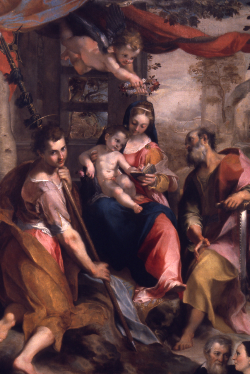 Servizio fotografico : Urbino, 1975 / Paolo Monti. - Foglio: 1, Fotogrammi complessivi: 20/20 : Diapositiva, sviluppo cromogeno/ pellicola ; 35 mm. - ((Occasione: Documentazione per la mostra di Federico Barocci (Urbino, 1535-1616), catalogo della mostra, Bologna 1975, a cura di Andrea EMILIANI, Bologna, Edizioni Alfa. - Fonte: Agenda di Paolo Monti: Diapositive 24x36mm (1948-1982), presso Archivio Paolo Monti